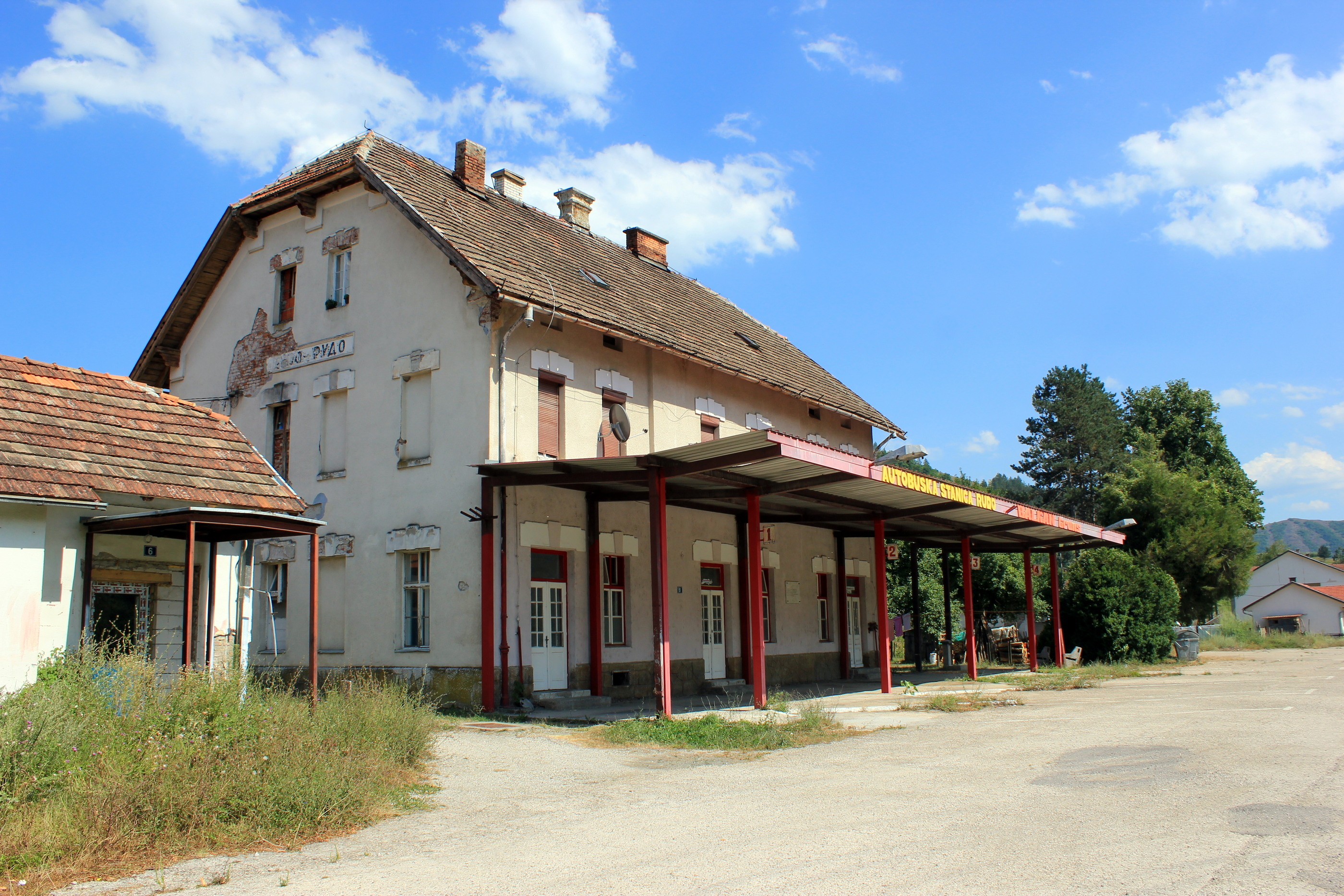 Der ehemalige Bahnhof von Rudo an einem Abzweig der Bosnischen Ostbahn.